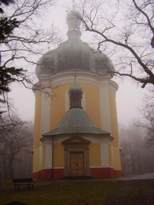 Kostel Lomec